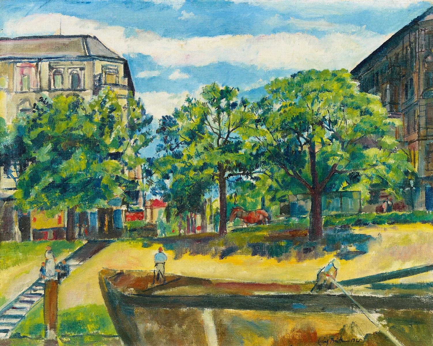 Die Englische Straße. 1925. Öl auf Leinwand. 54 x 64 cm. Signiert und datiert unten rechts: Erich Büttner 1925. Verso auf Keilrahmen bezeichnet: Erich Büttner–Berlin / Die Englische Straße 15 1925.